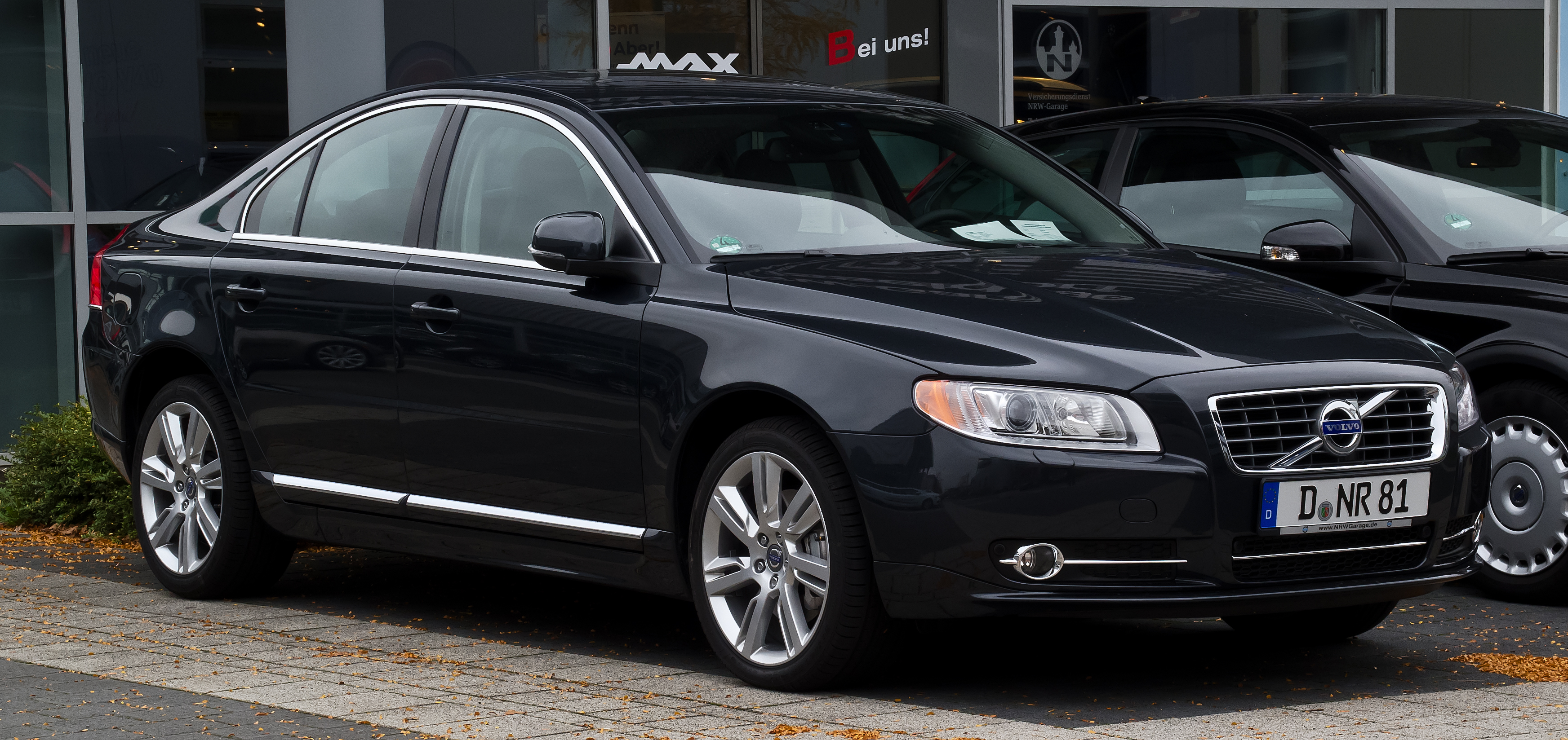 Volvo S80 D5 Momentum (II, Facelift)